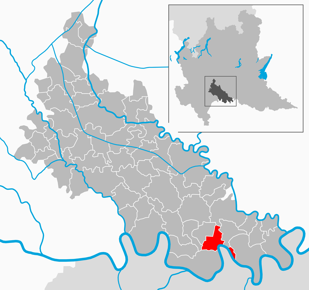 Il comune di Santo Stefano Lodigiano nella provincia di Lodi